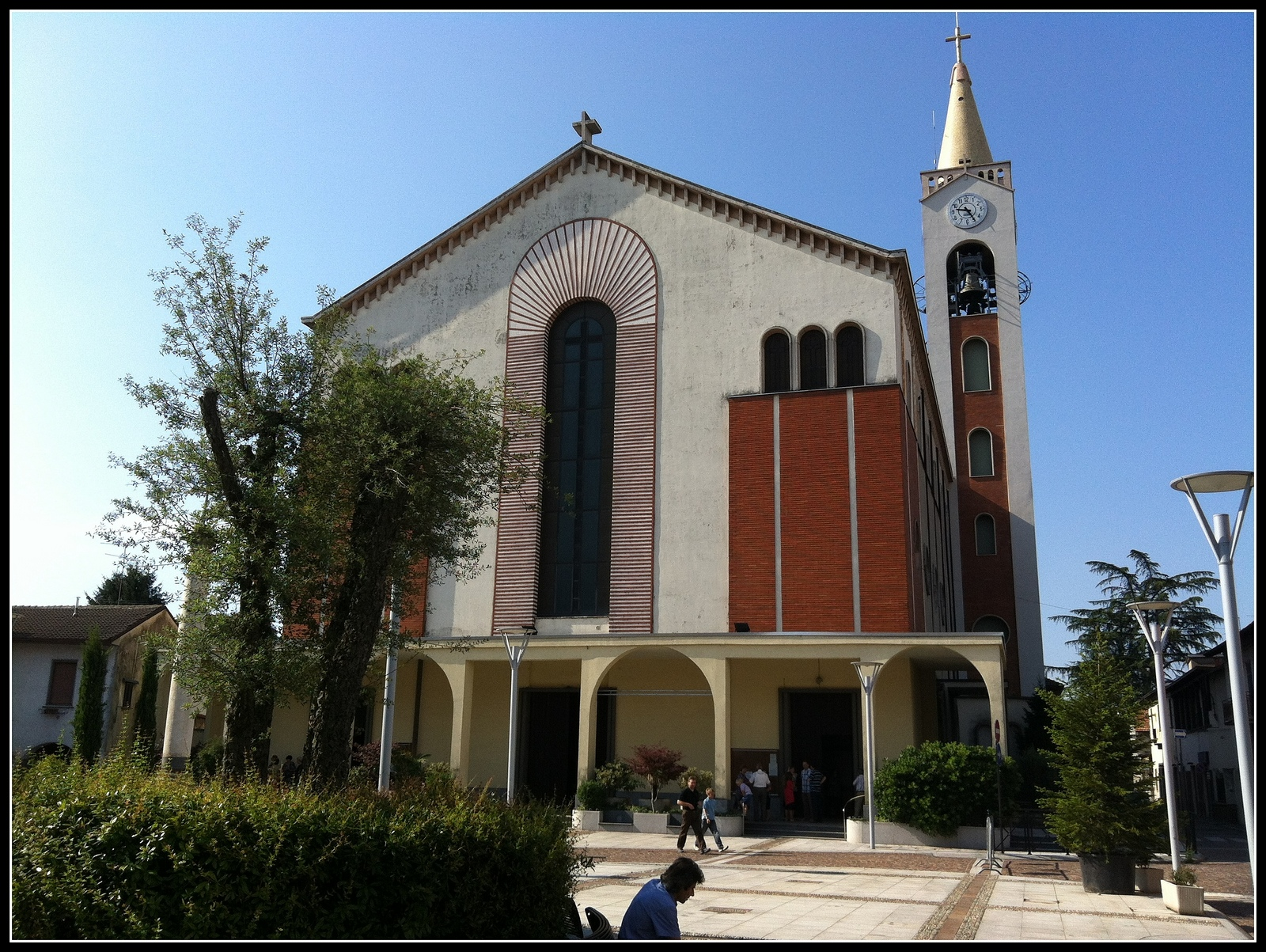 Buscate - Chiesa di San Mauro Abate